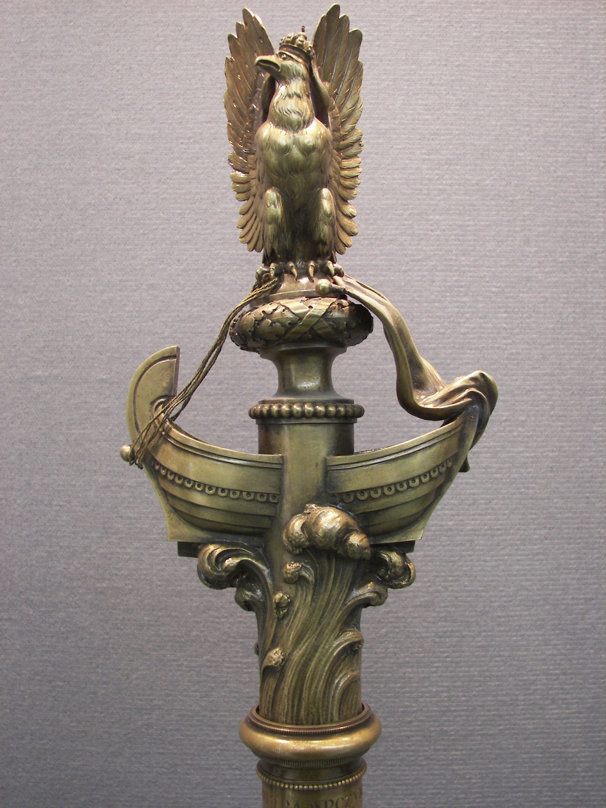 Sejm RP, Laska Wojciecha Trąmpczyńskiego, Marszałka Sejmu Ustawodawczego 1919 - 1922. Wykonała Firma Braci Łopieńskich wg projektu Józefa Smolińskiego (1921), zdjęcie wykonane 24 stycznia 2007 roku, autor: Piotr VaGla Waglowski